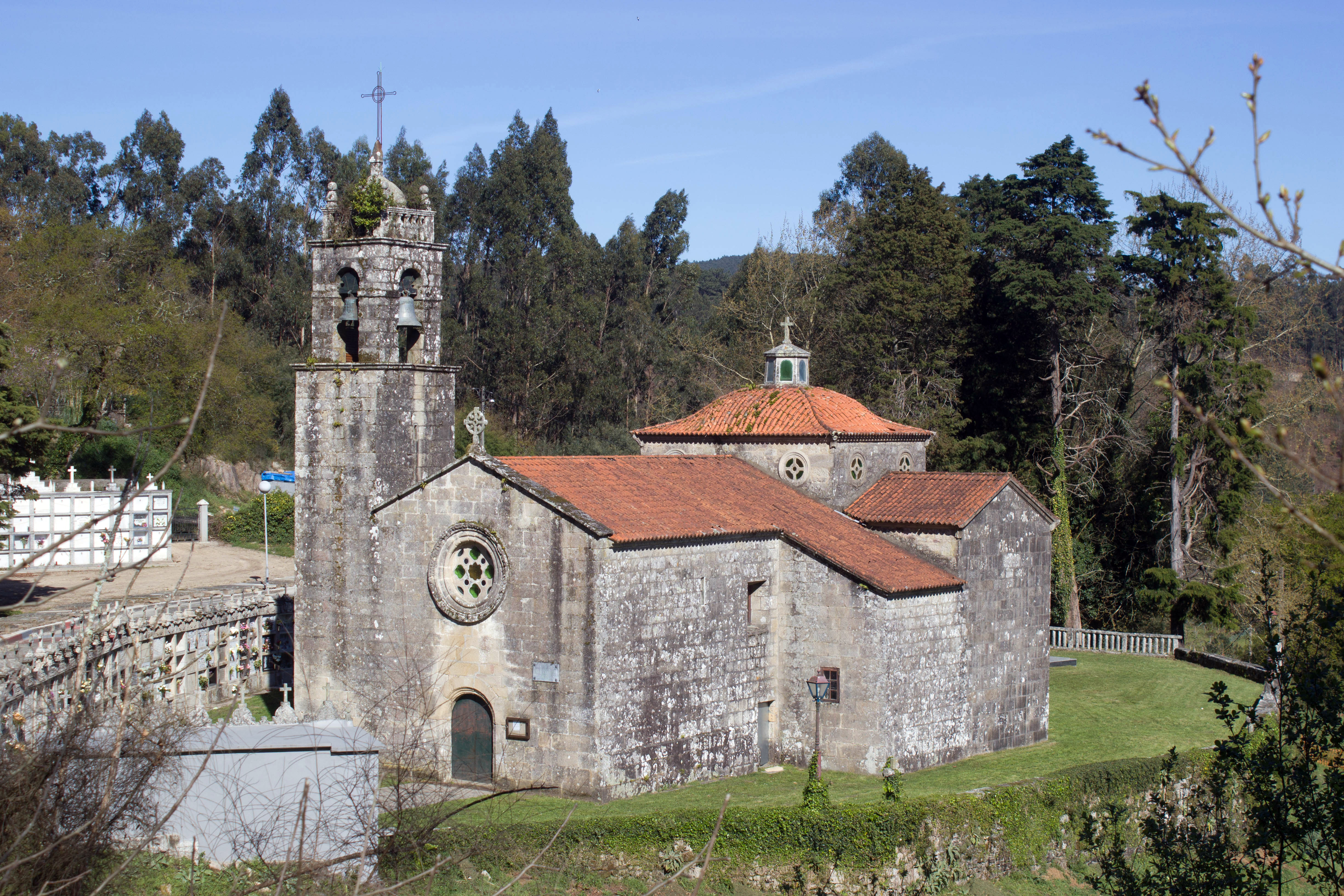 Igrexa de Santa María de Bemil, no concello da Caldas de Reis.